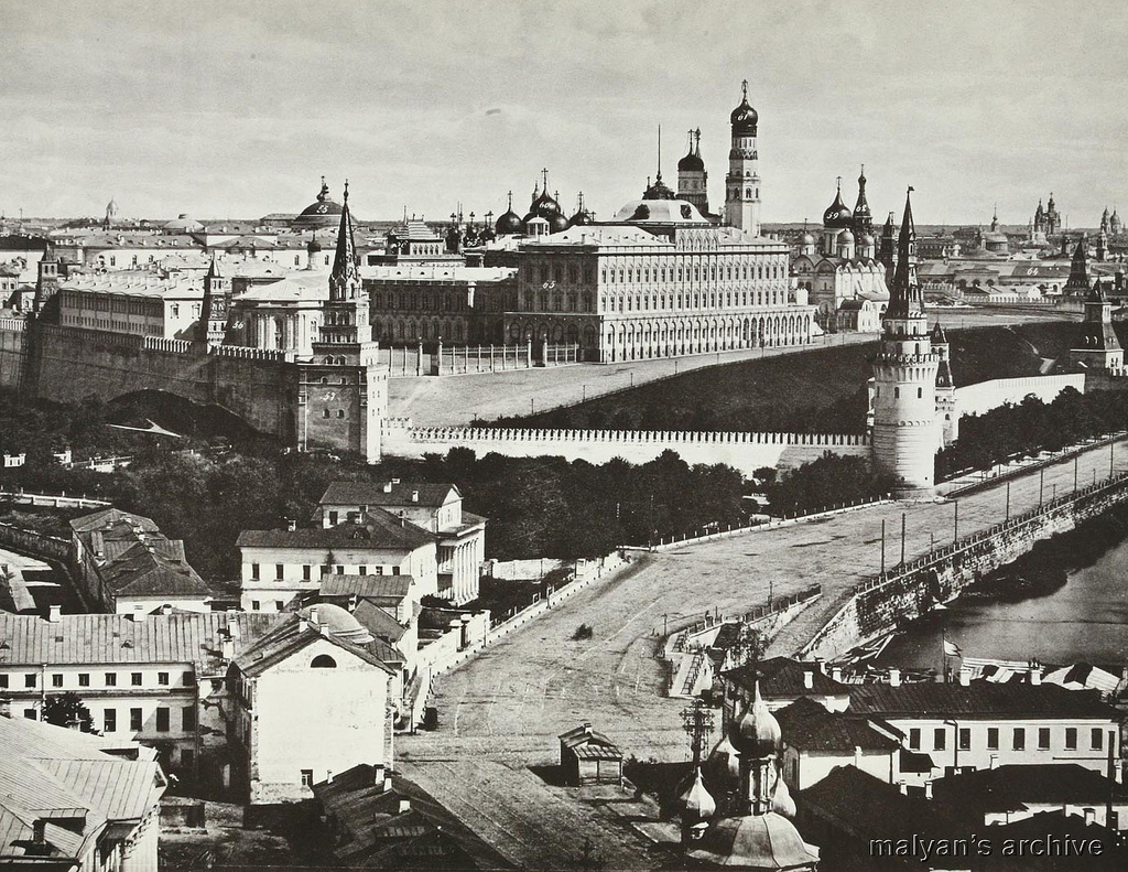 Кремль, набережная.